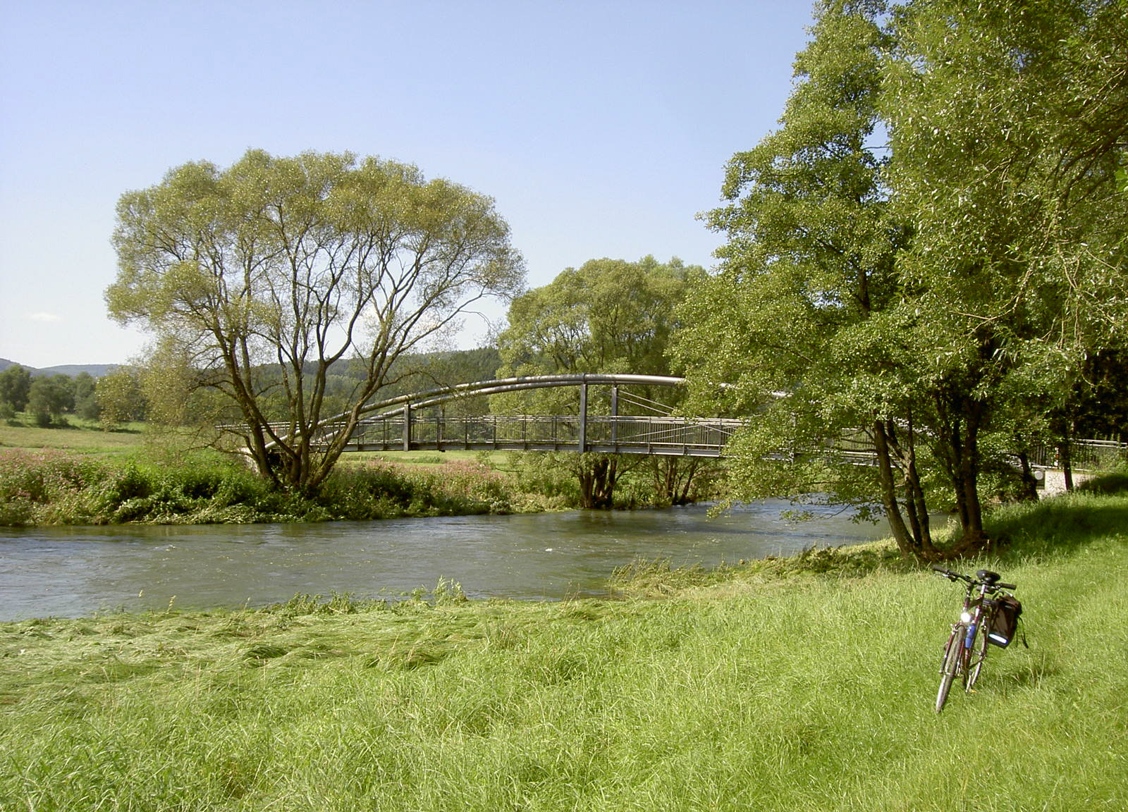 small river near Battenberg (Auhammer)